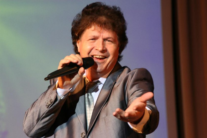 Народний артист України, професор Київського університету імені Бориса Грінченка Фемій Мустафаєв на Новорічно-Різдвяному концерті-вітання 17 січня 2012 року у Великій актовій залі навчального корпусу №1 Київського університету імені Бориса Грінченка (вул. Маршала Тимошенка, 13-Б).